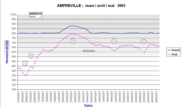 Ce graphique représente les cotes amont en bleu et aval en rouge du dernier barrage sur la Seine avant le bief marin. On peut remarquer que les cotes des deux courbes ont progressé en hauteur proportionnellement à la crue, et qu'à aucun moment elles ne se sont rejointes, indiquant qu'au plus fort de la crue, bien que des riverains fussent inondés, on retenait volontairement l'écoulement de la Seine.